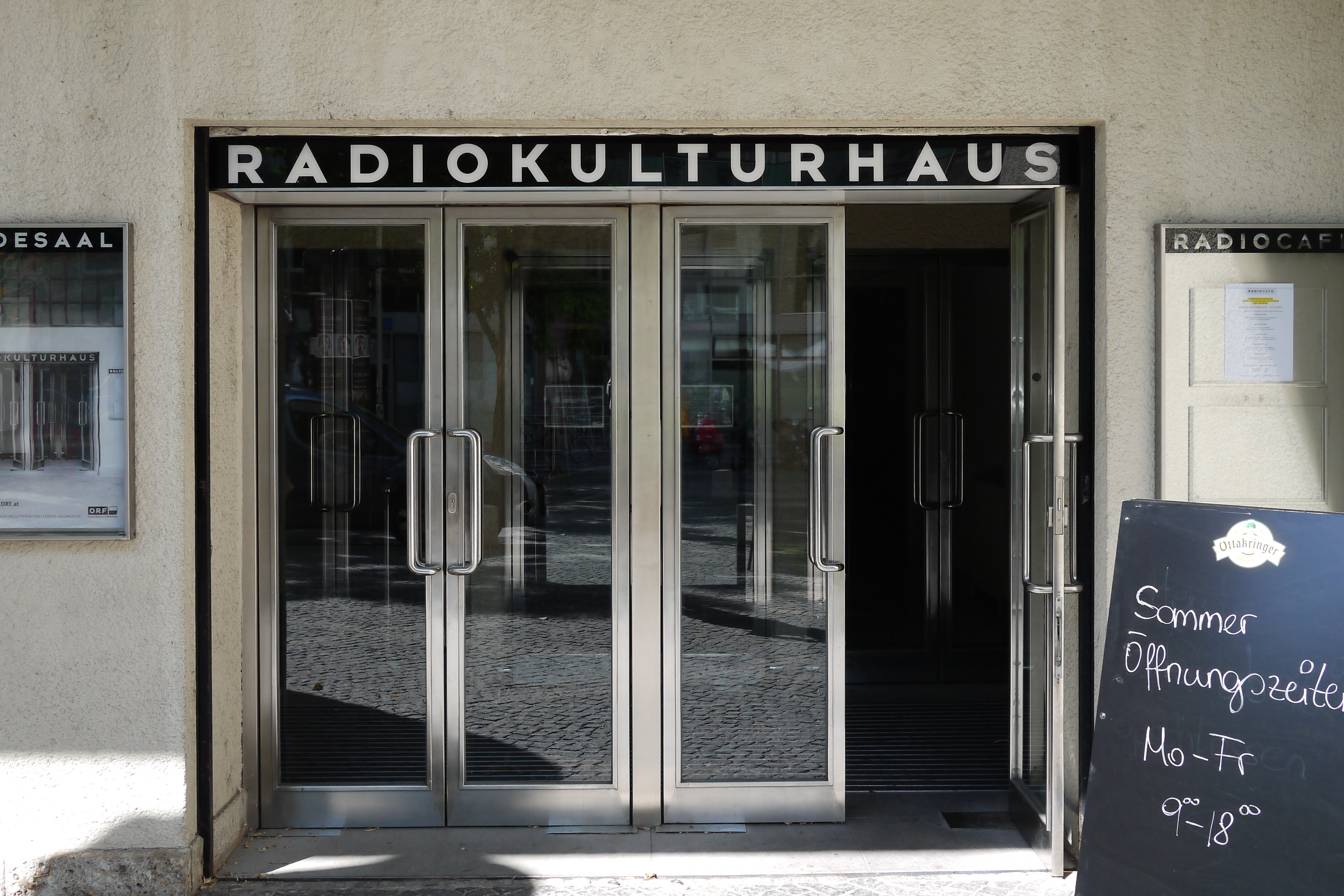 Funkhaus, ORF